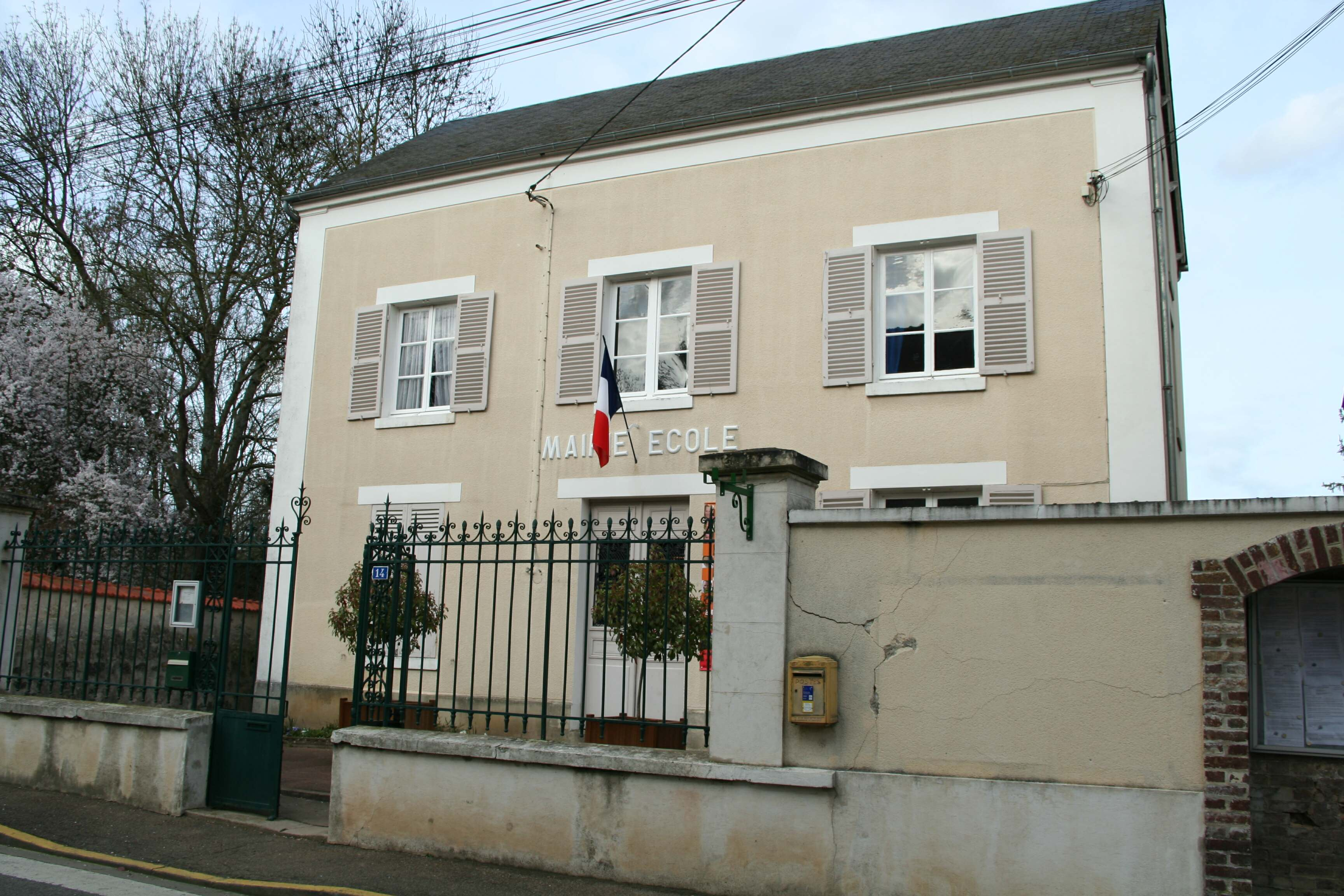 Mairie de Brueil-en-Vexin - Yvelines (France)